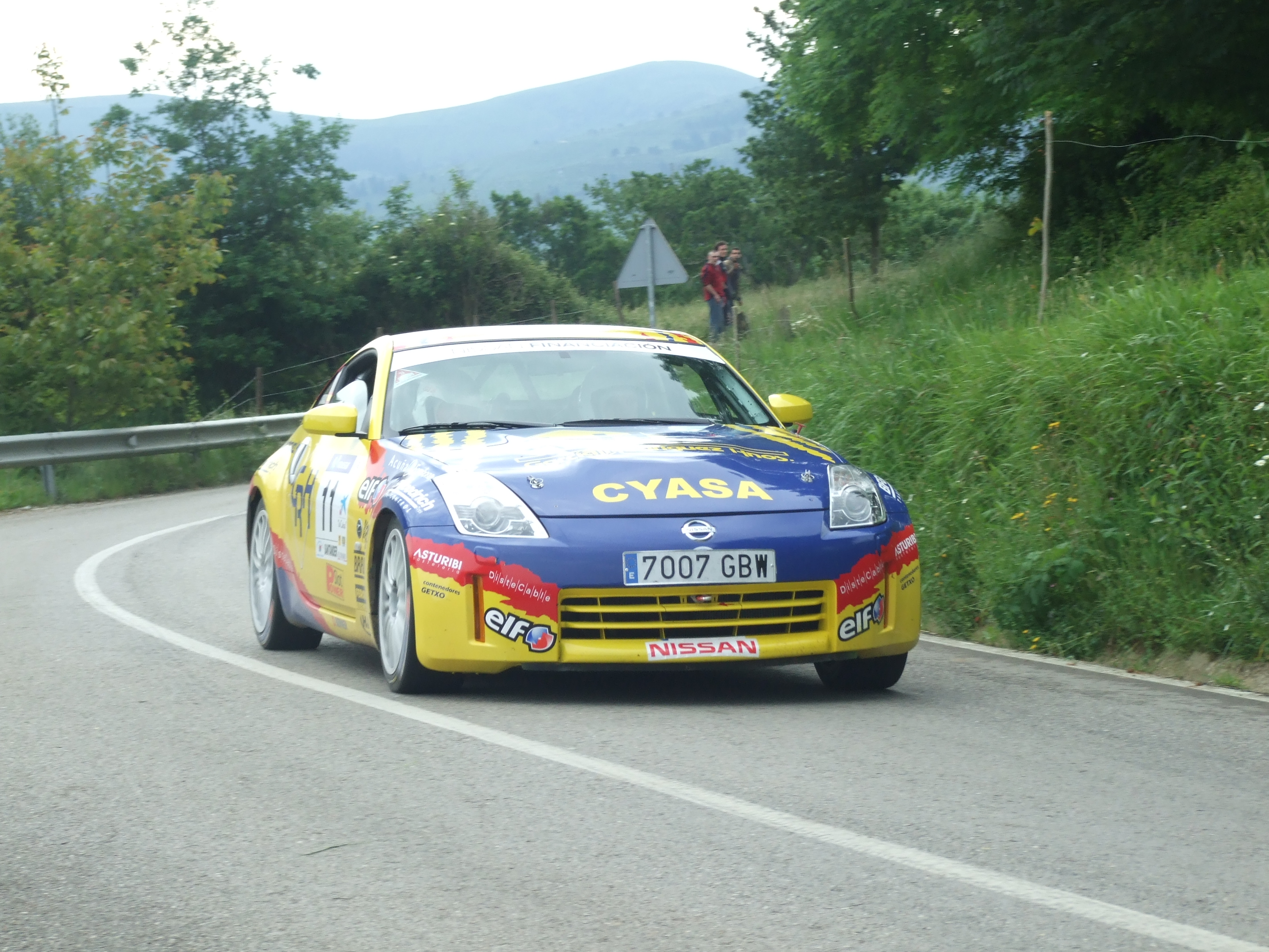 Sergio López-Fombona y Juan Carlos Dorado con un Nissan 350 Z en el Rallye Cantabria Infinita 2008 en Lloreda de Cayón